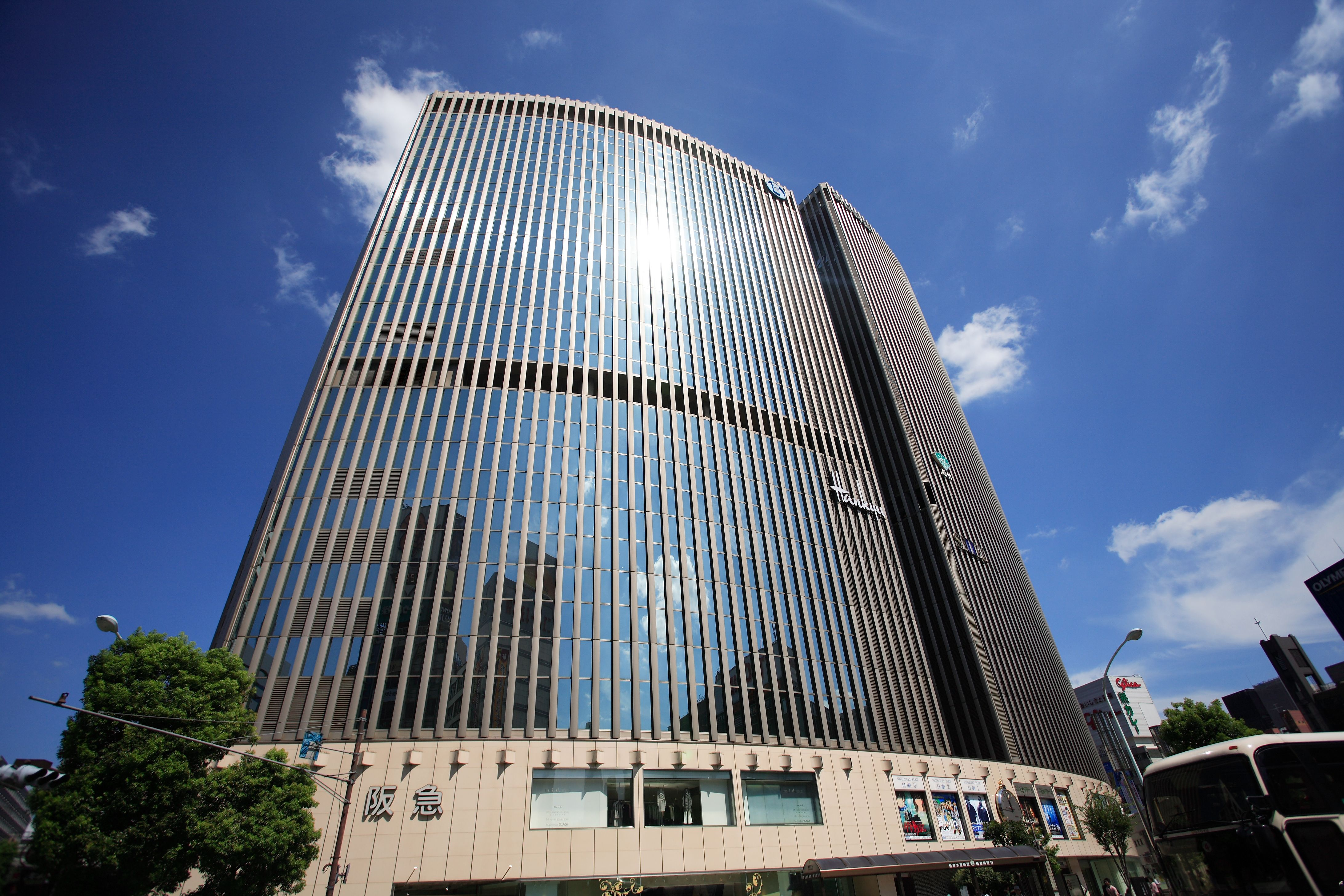 Yurakucho Hankyu, Chiyoda Ward , Tokyo , Japan.